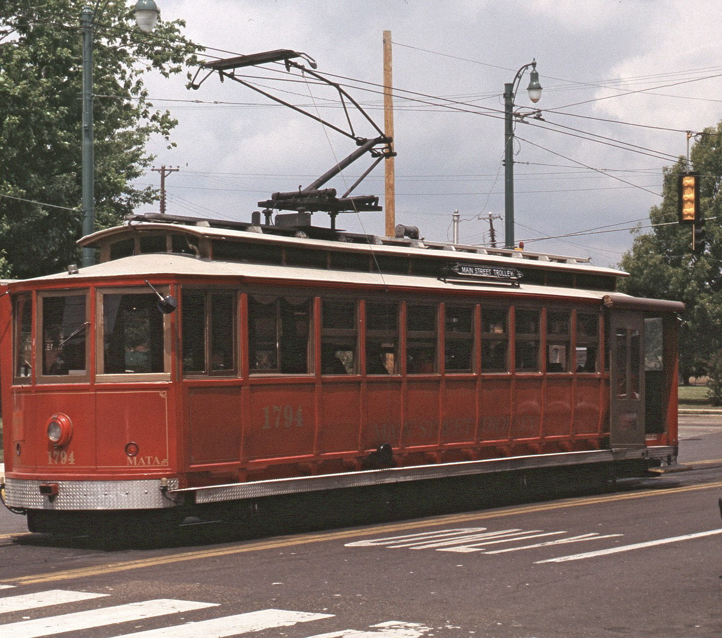 Memphis Wagen 1794 ex Rio de Janeiro